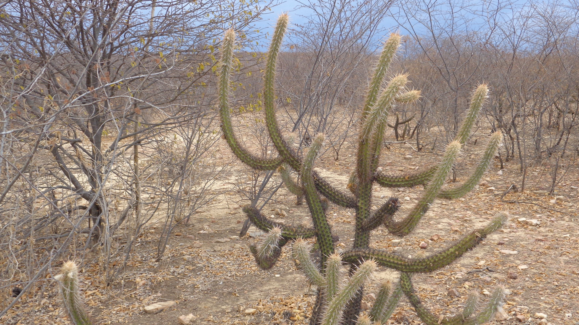 cactus0012